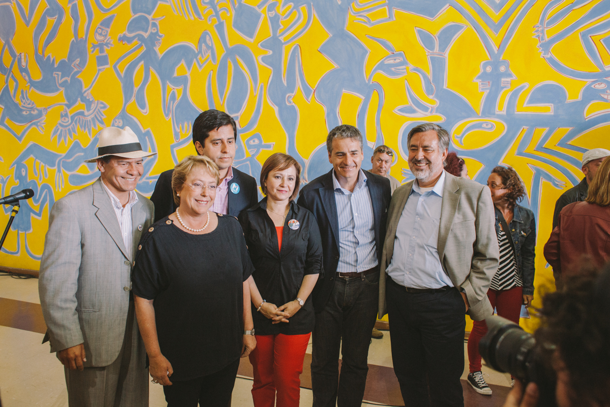 Antofagasta 09/11/2013